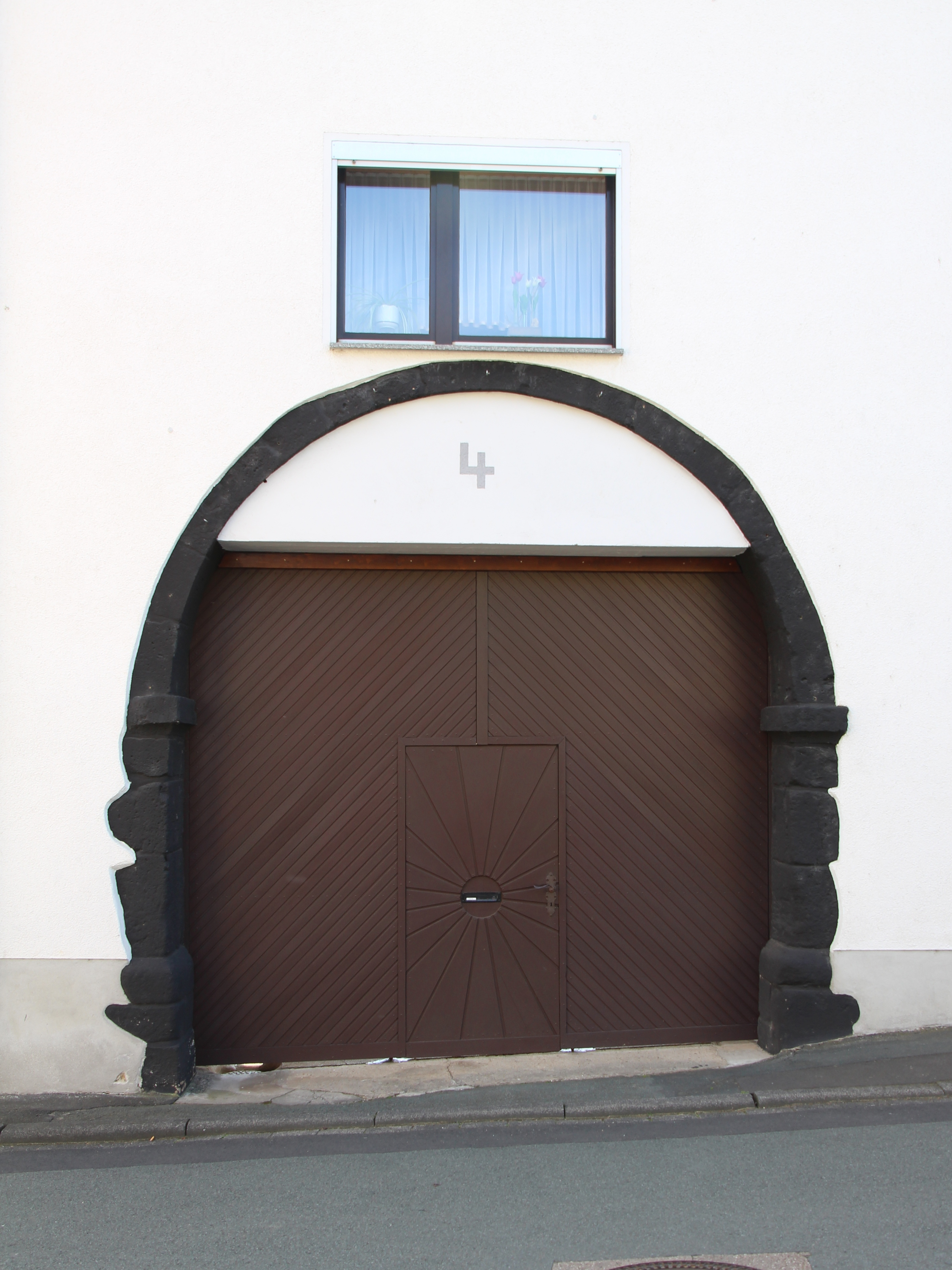 Ehemaliger Klosterzugang - Lahnberg 4